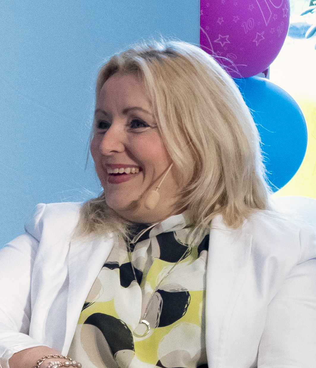 20190702 Almedalsveckan i Visby på Gotland. Danmarks ambassadör i Sverige Ove Ullerup och ledamoten i Hamburgs delstatsparlamwent Christel Nicolaysen (FDP) som är född i Ängelholm men bosatt utanför Hamburg. Moderator är Johan Wester (till vänster i bild). Photo: News Øresund - Johan Wessman © News Øresund - Johan Wessman (CC BY 3.0). Detta verk av News Øresund är licensierat under en Creative Commons Erkännande 3.0 Unported-licens (CC BY 3.0). Bilden får fritt publiceras under förutsättning att källa anges. .The picture can be used freely under the prerequisite that the source is given. News Øresund, Malmö, Sweden News Øresund är en oberoende regional nyhetsbyrå som är en del av det oberoende dansk-svenska kunskapscentrat Øresundsinstituttet.. .